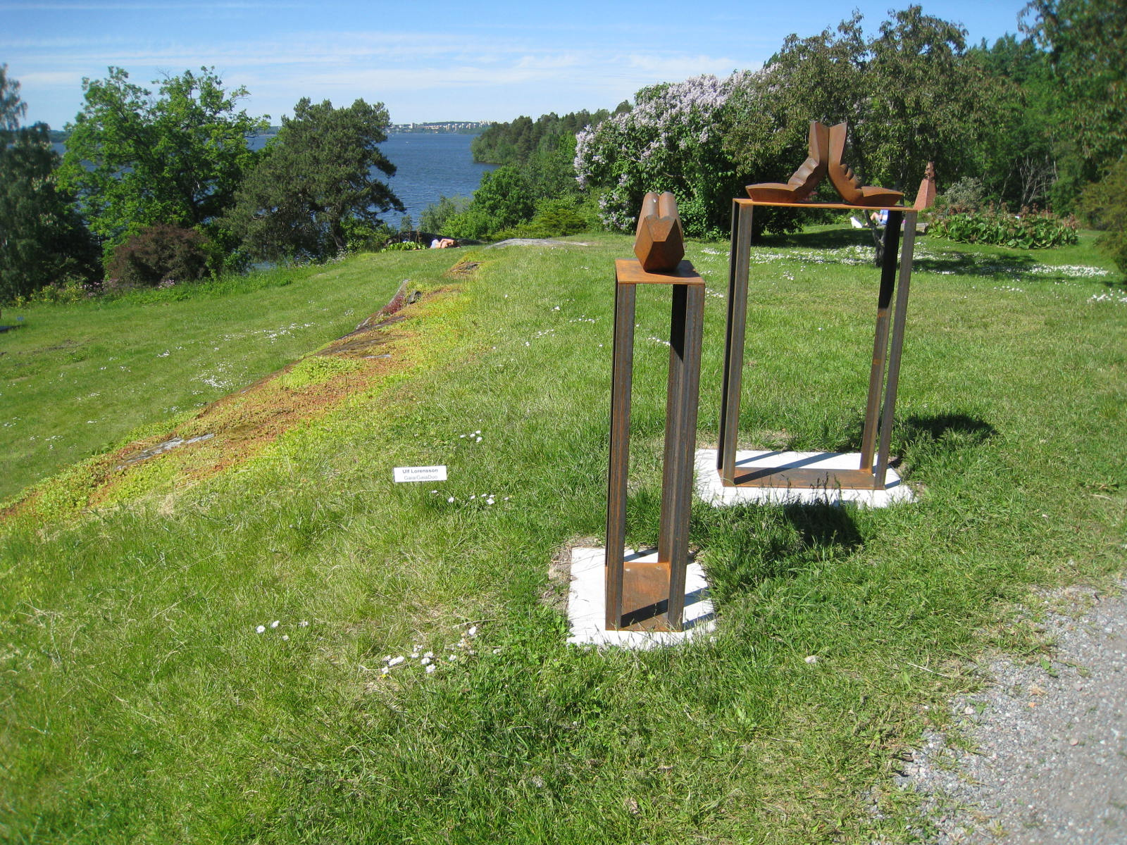 Ulf Lorensson, Görvälns skulpturpark, Järfälla kommun, foto juni 2015.